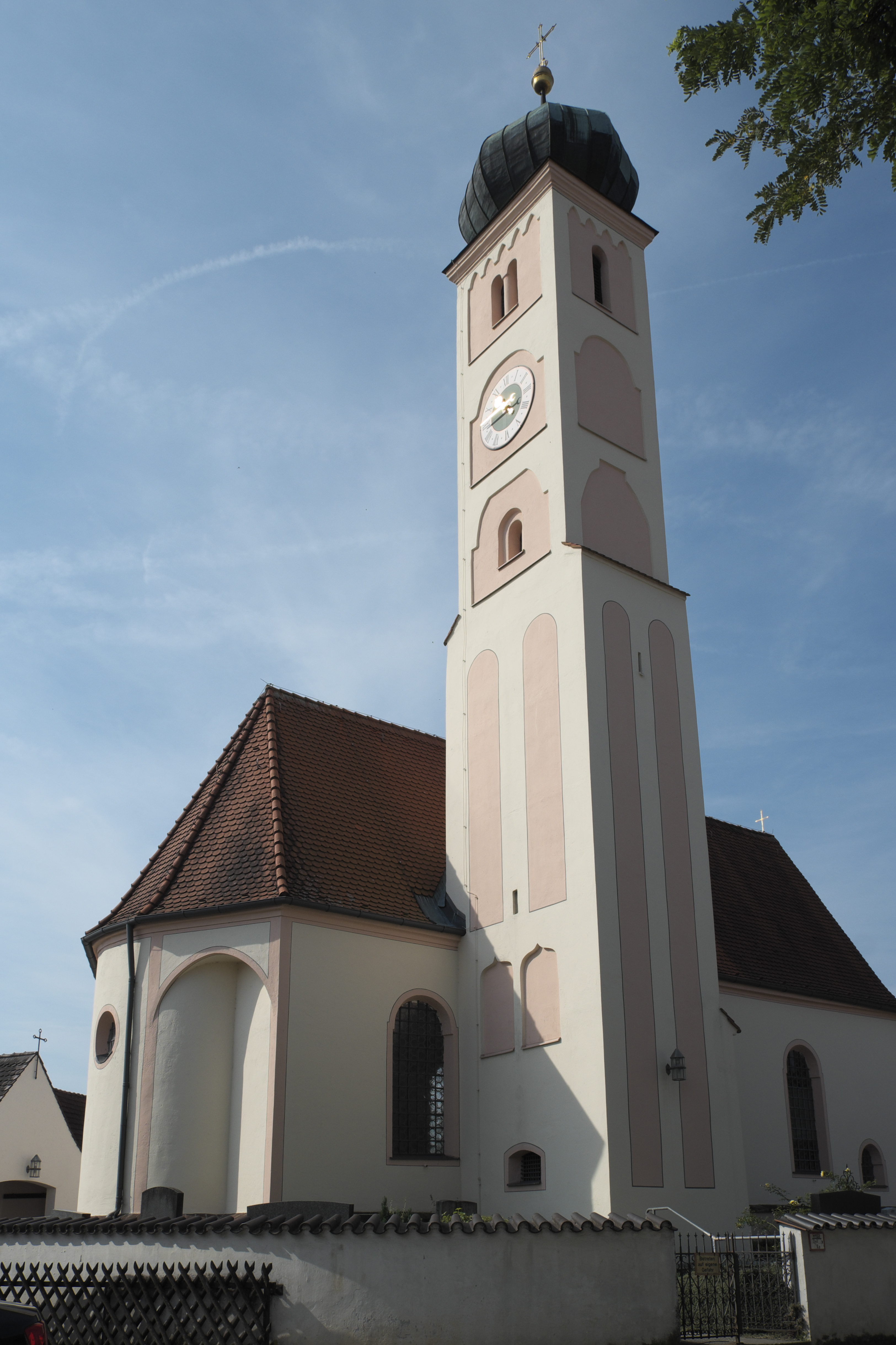 Katholische Pfarrkirche St. Johannes Baptist in Zankenhausen (Türkenfeld) im Landkreis Fürstenfeldbruck (Bayern/Deutschland)